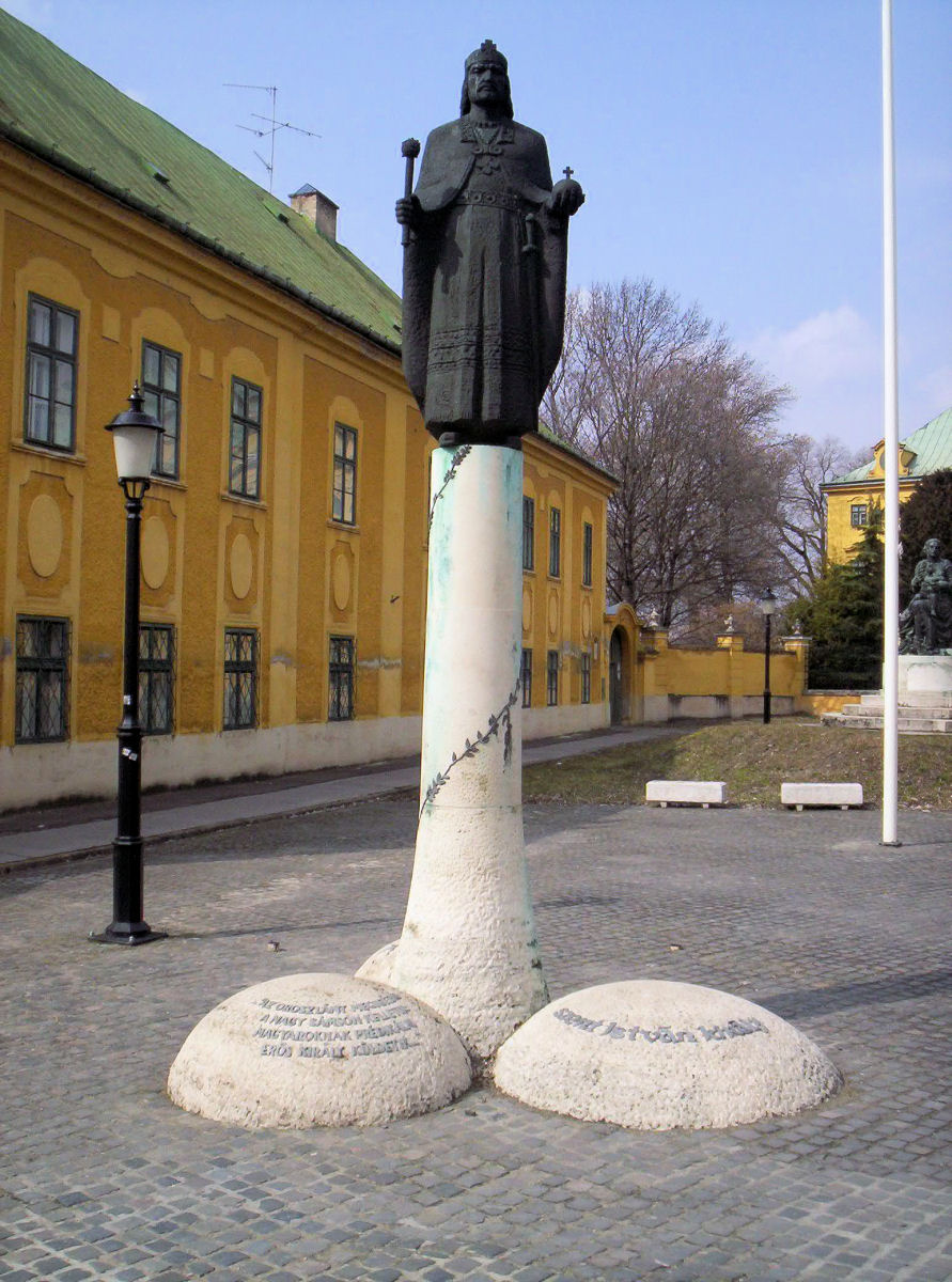 Szent István-szobor Kalocsán. Kirchmayer Károly szobrász és Vadász György építész alkotása. – photo taken by uploader User:Csanády in 2006. Statue of Stephen I of Hungary in Kalocsa. Probably one of the most unintentionally funny statues of the world.